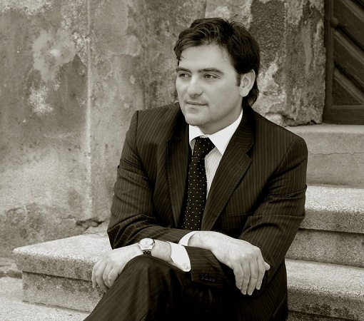 Вања Чобанов